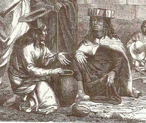 Indigenas atacameños. Dibujo de Bassot según una fotografía.